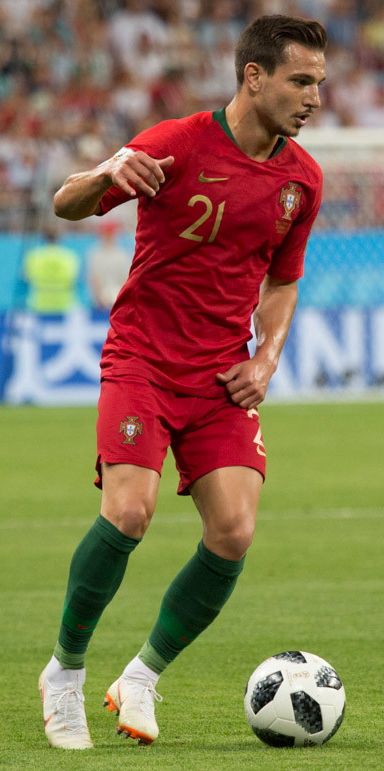 Гол на 93-й минуте и незабитый пенальти Роналду. Иран попортил нервы португальцам